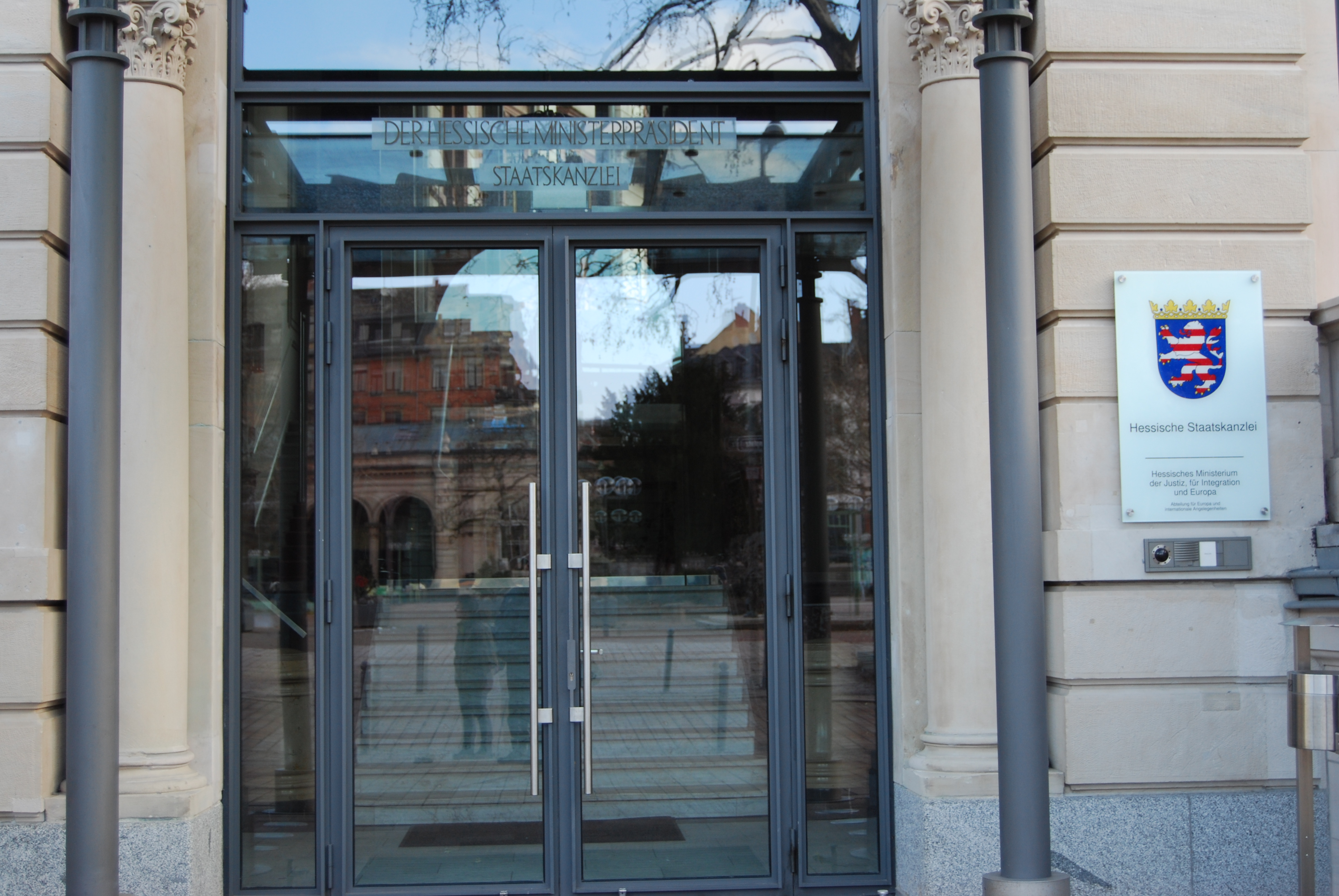 Die Hessische Staatskanzlei in Wiesbaden, Februar 2010